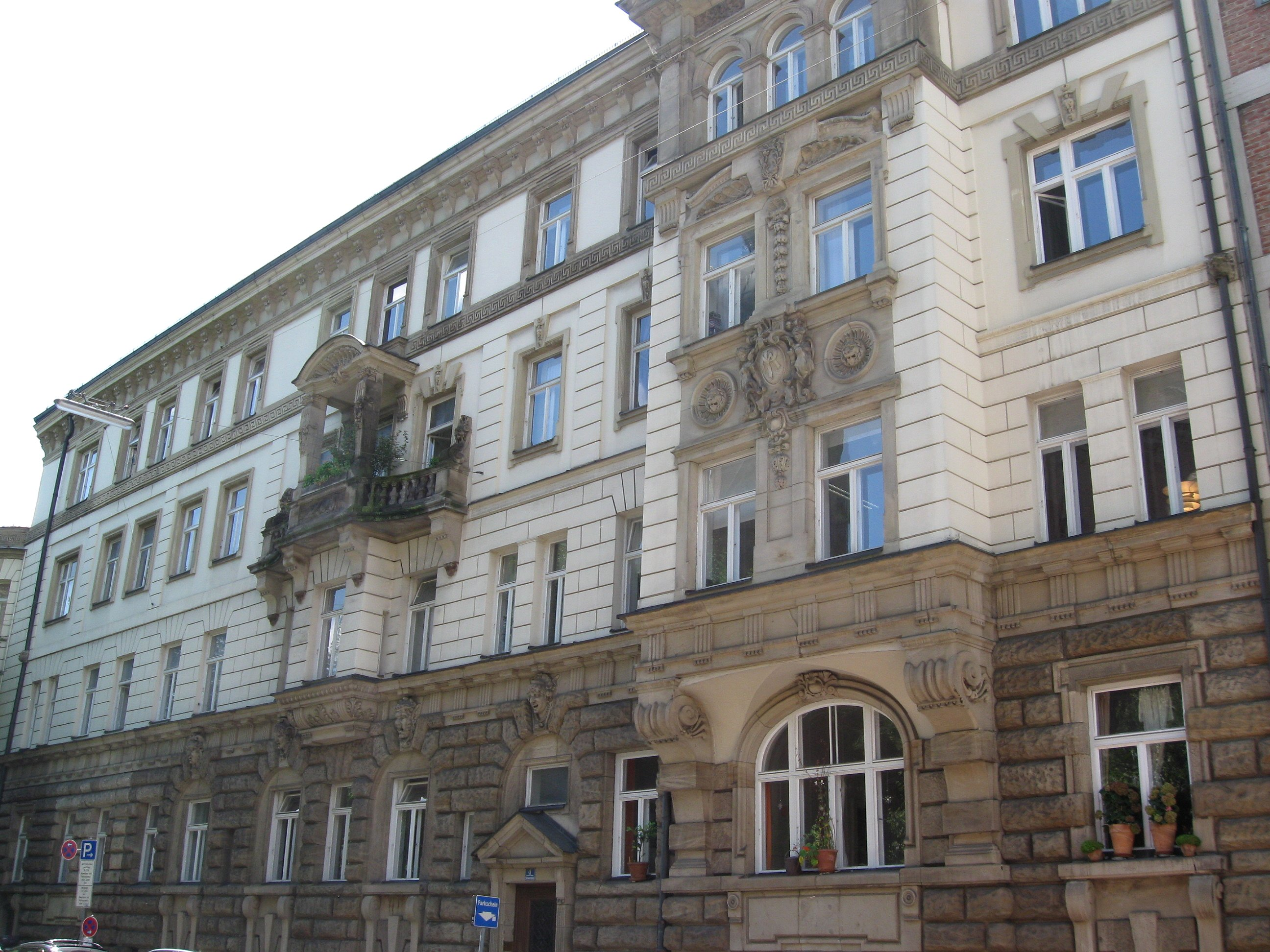 Mariannenplatz 4; Mietshaus, neubarock mit reichem plastischem Dekor, z. T. in Haustein, 1893-94 von Albin Lincke und Carl Vent; gestalterische Einheit mit dem Block Steinsdorfstraße 10.